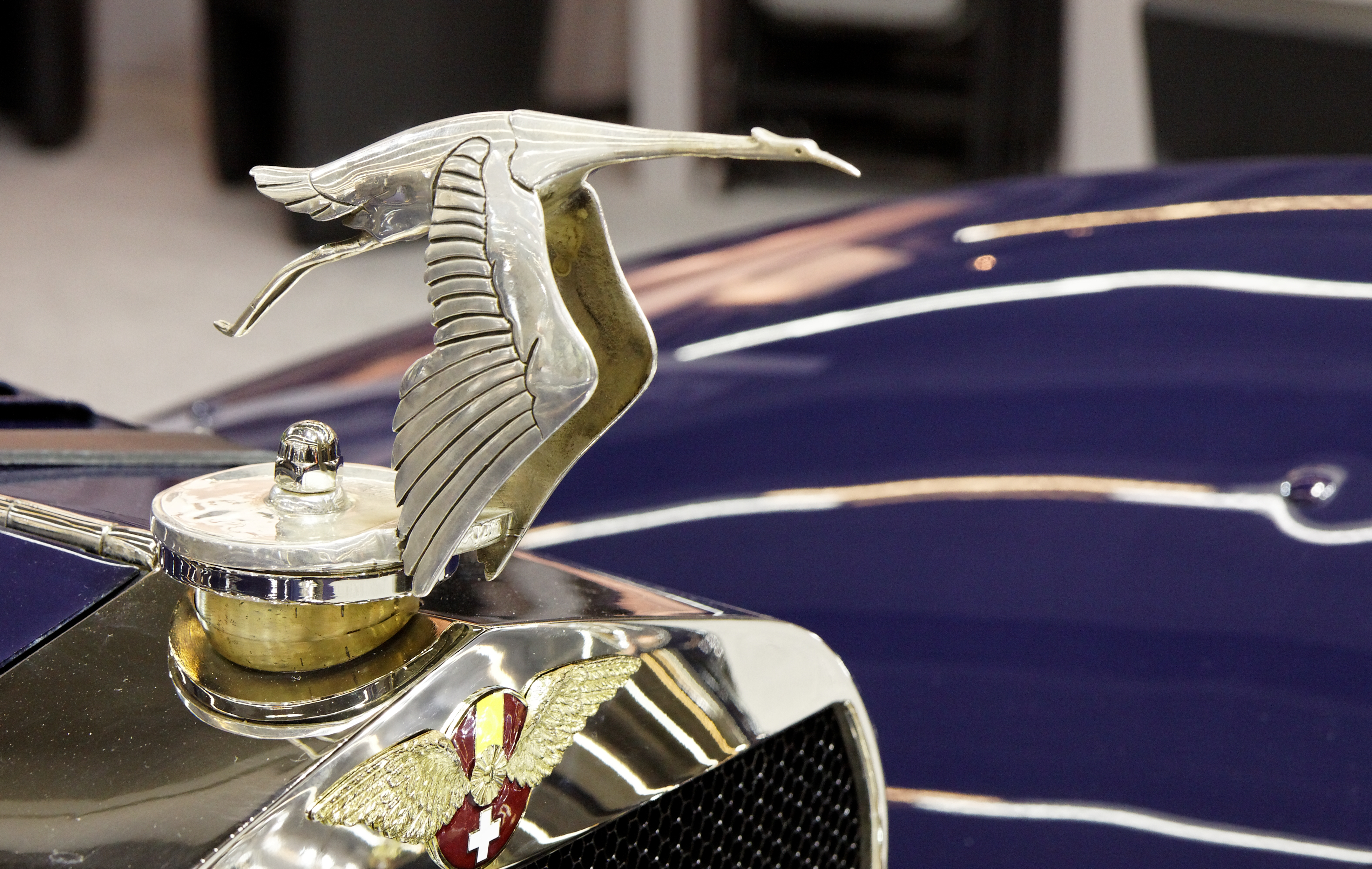 Photographie prise lors du salon rétromobile 2011 à Paris, porte de Versailles.